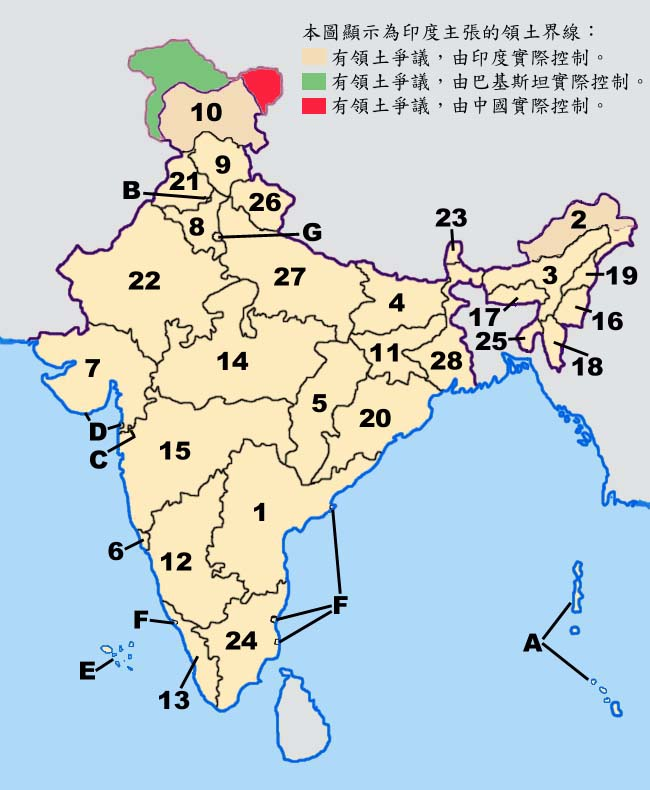 印度行政區劃總圖（新）。